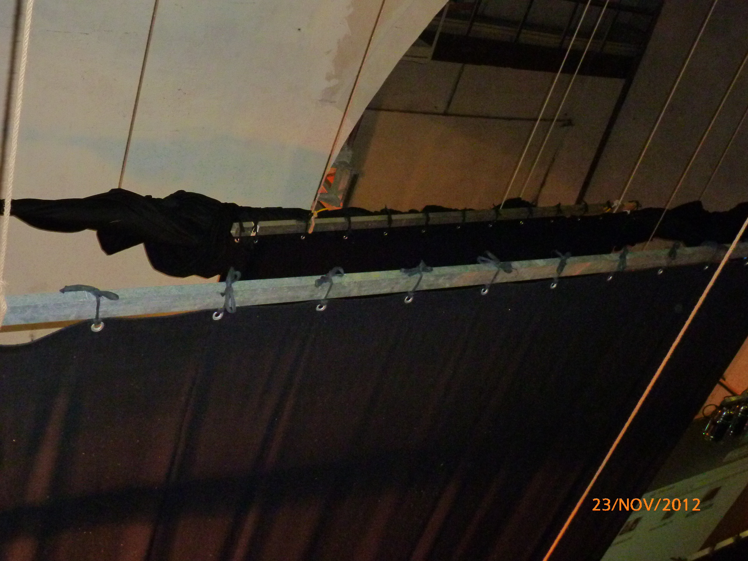 Stangone in metallo